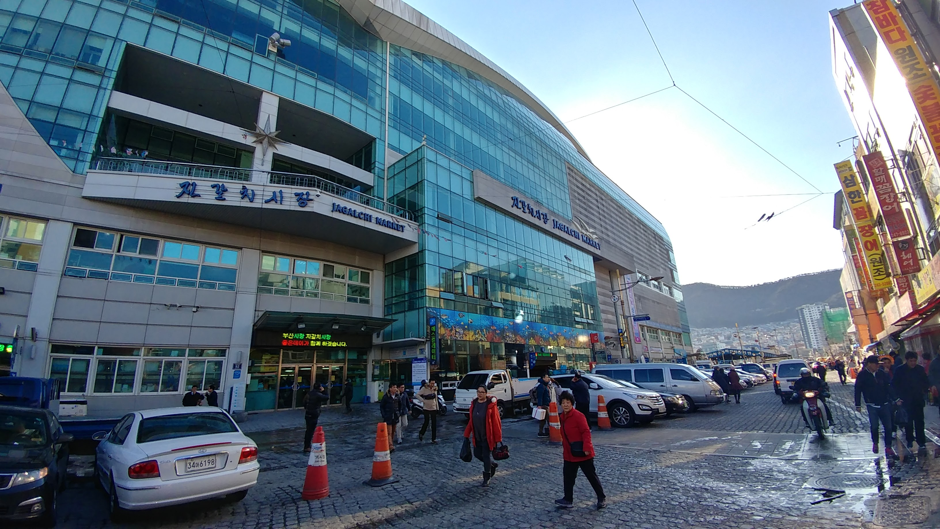 부산 자갈치 시장